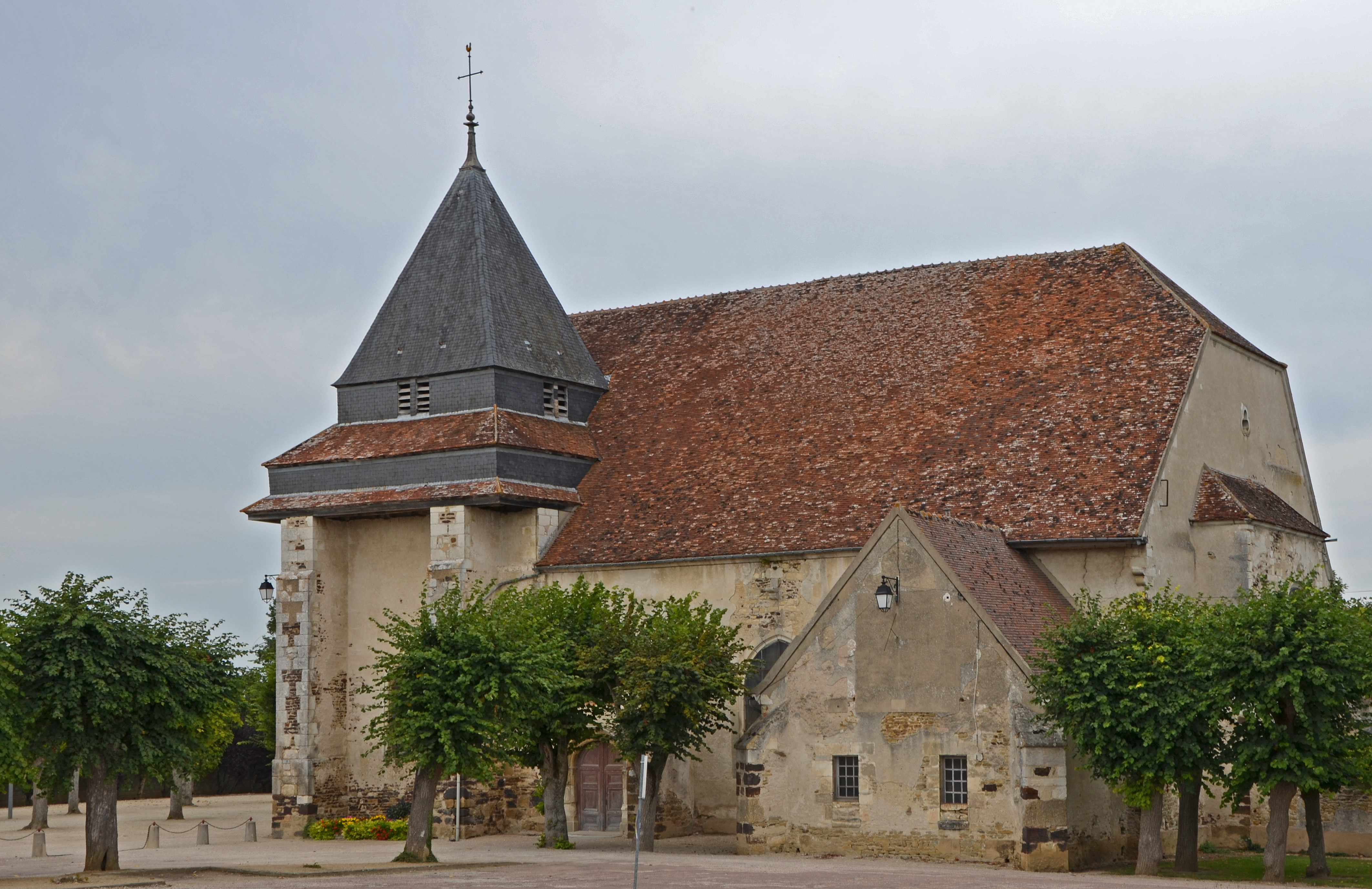 Église de Héry, Yonne, Bourgogne, France